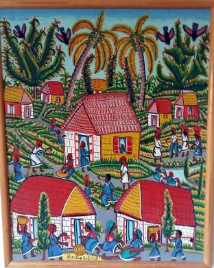 huile sur mansonite, village Haïtien.